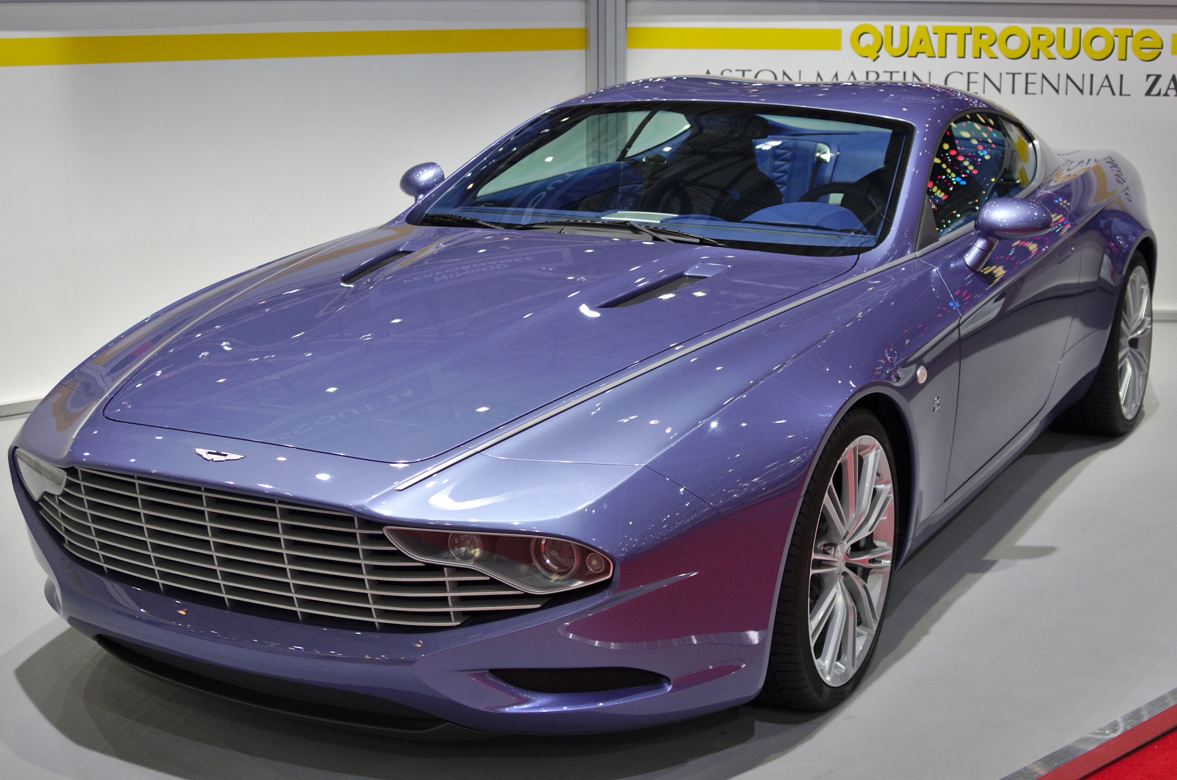 Salon de l'auto de Genève 2014 - 20140305 - Aston Martin